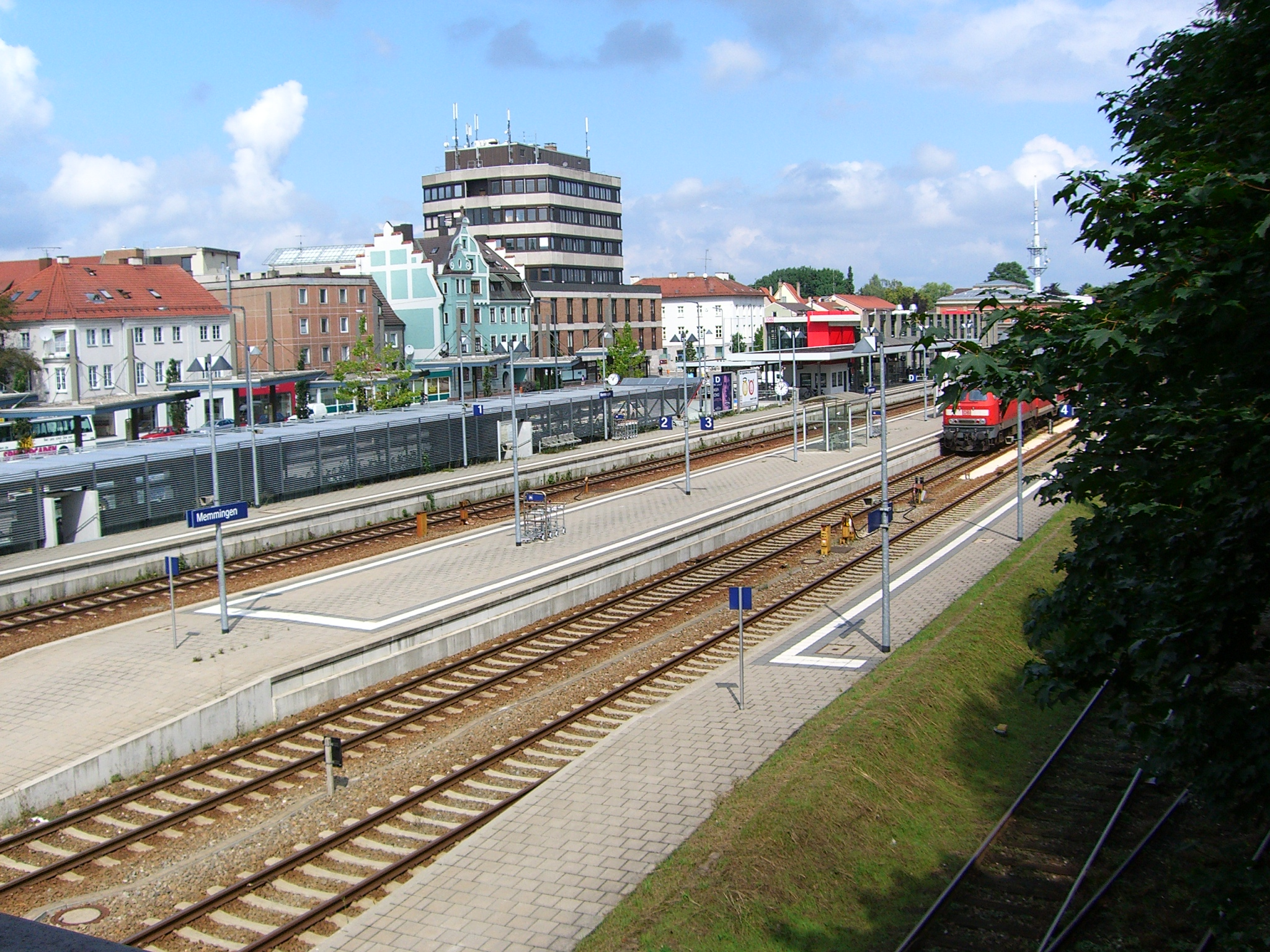 Bahnhof mit Bahnhofstraße und Maxicenter